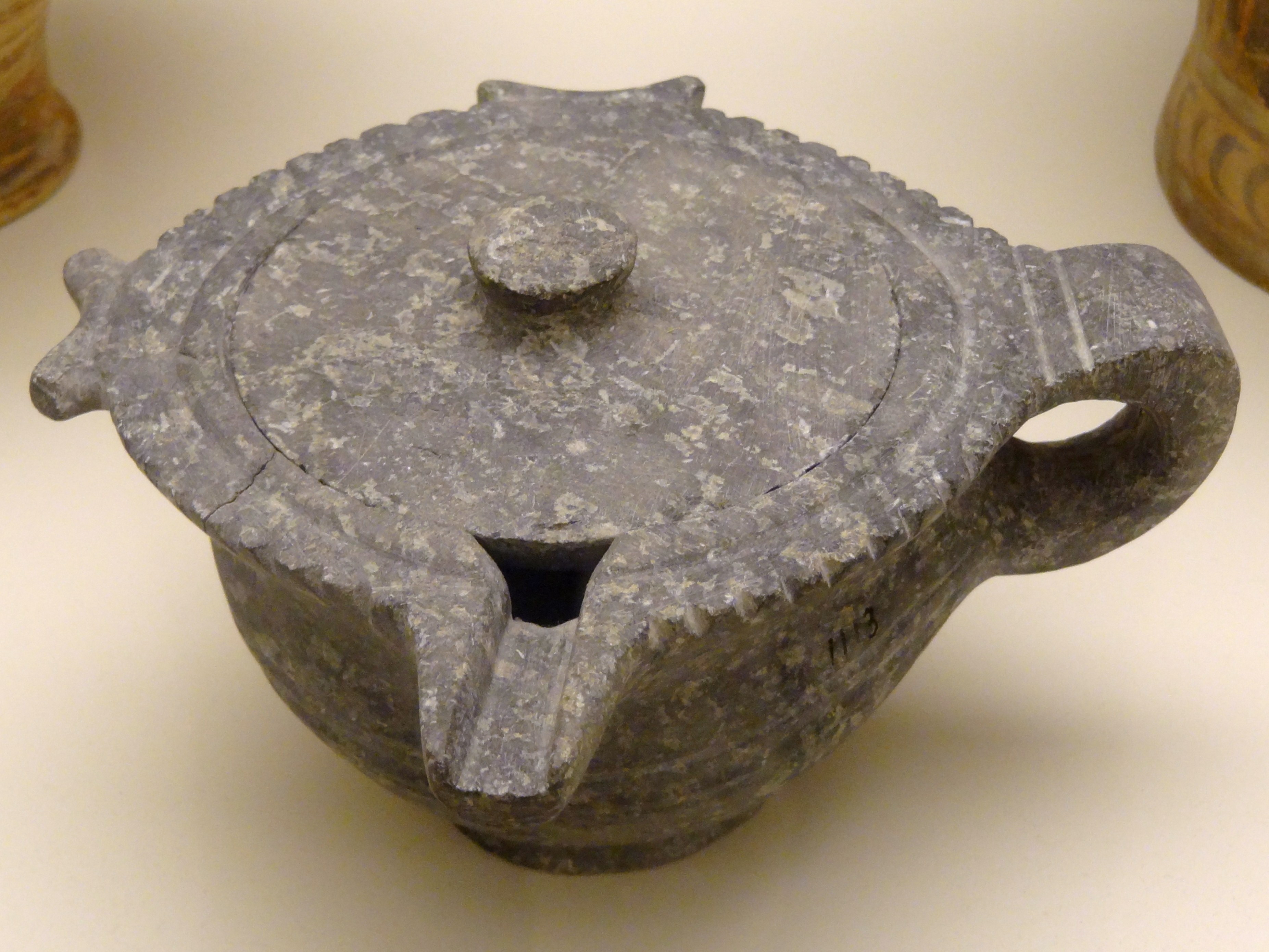 Steinvase mit Deckel (Neupalastzeit, 1600–1500 v. Chr.) aus Psira, ausgestellt im Archäologischen Museum Iraklio, Kreta, Griechenland